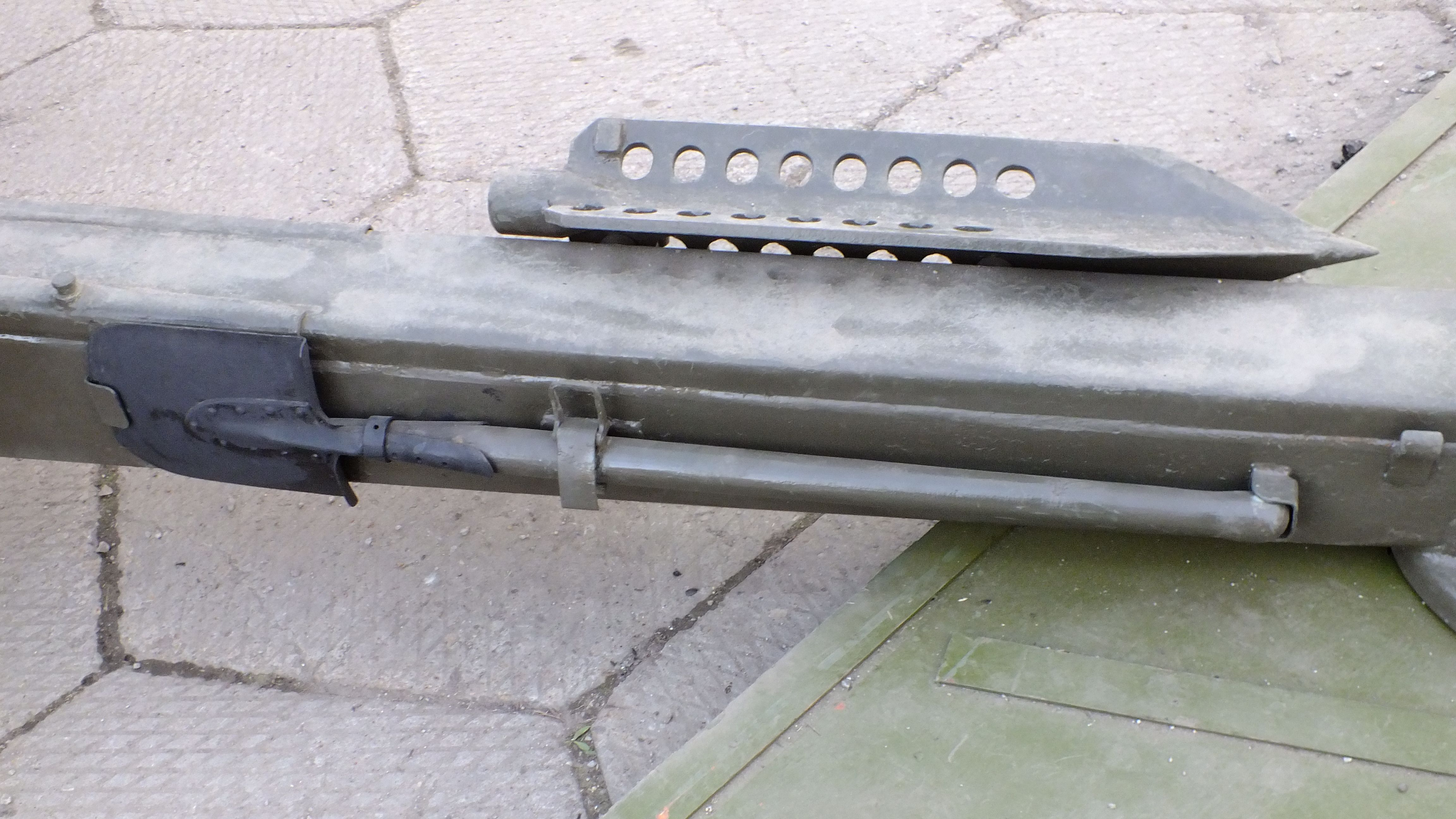 Большая сапёрная лопата на лафете артиллерийского орудия